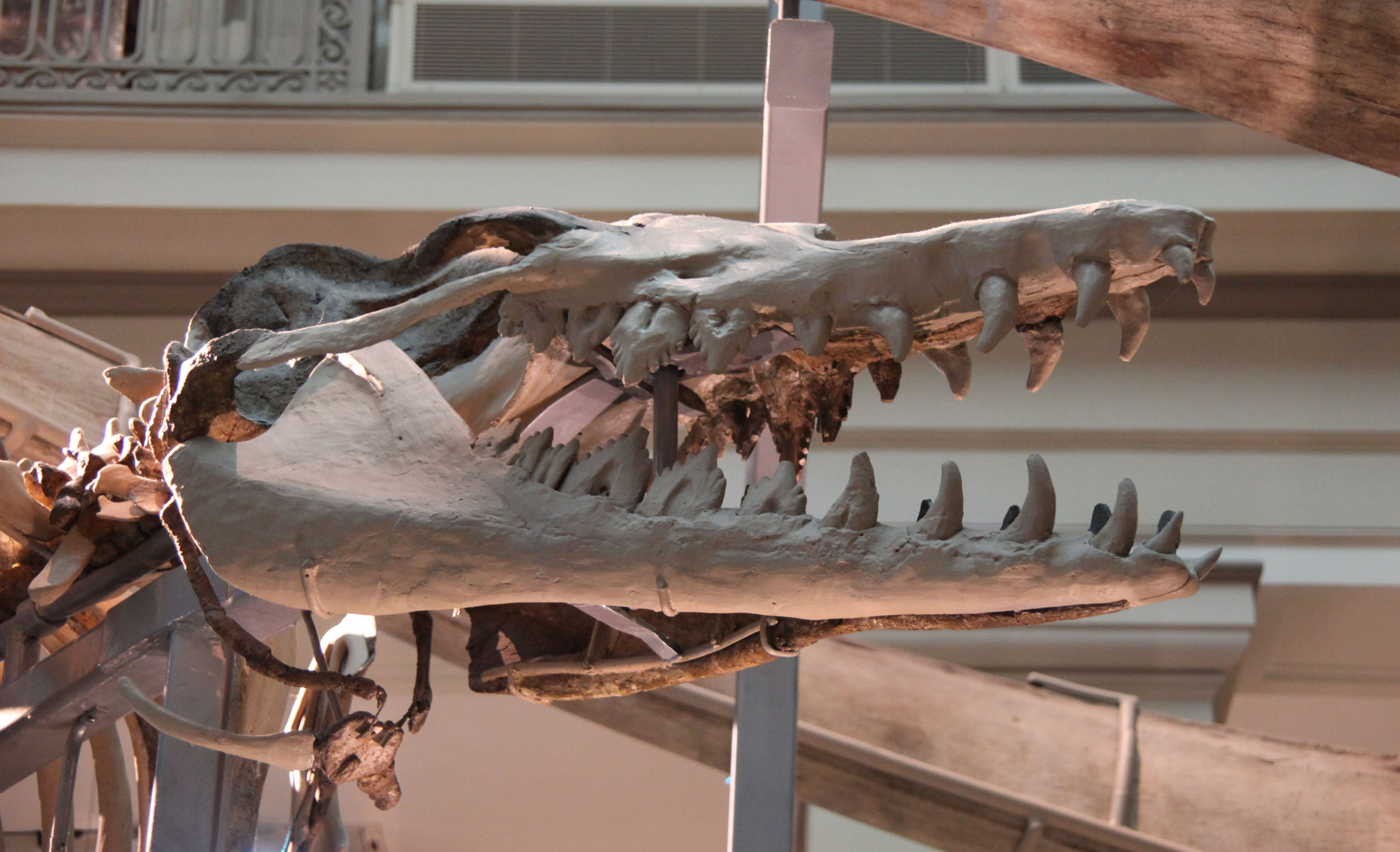 Basilosaurus cetoides (file name is a misnomer).